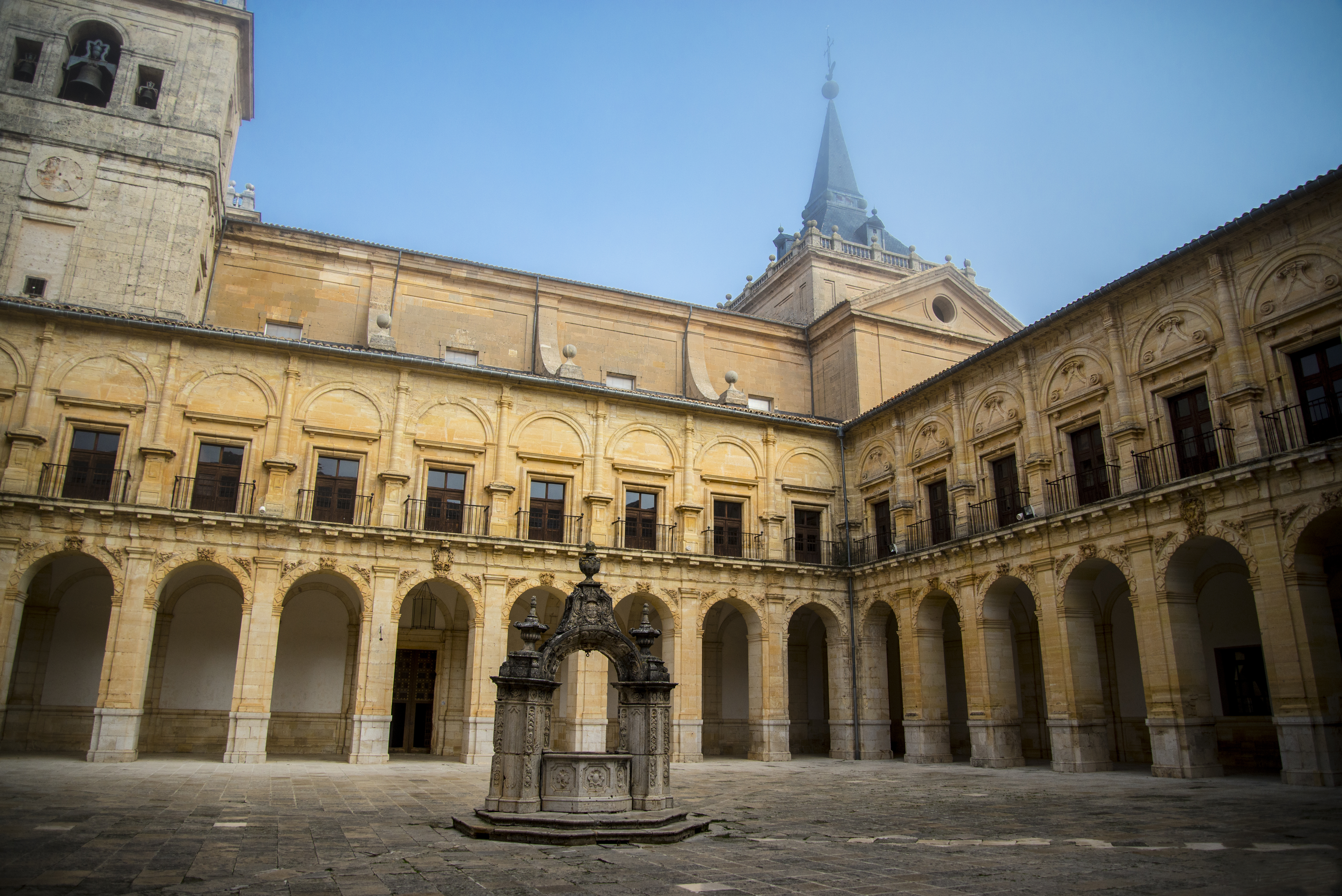 Monasterio de Uclés Cuenca